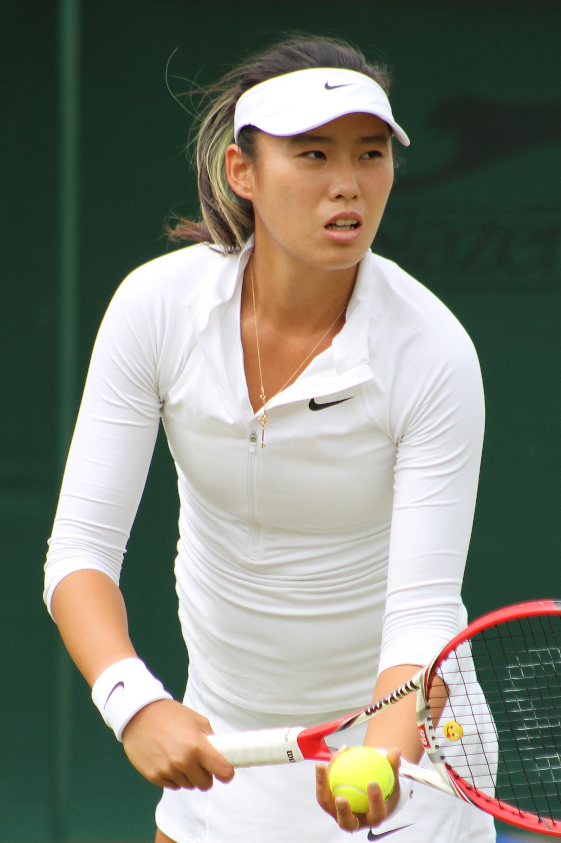 Yang Z. WMQ15 (5)